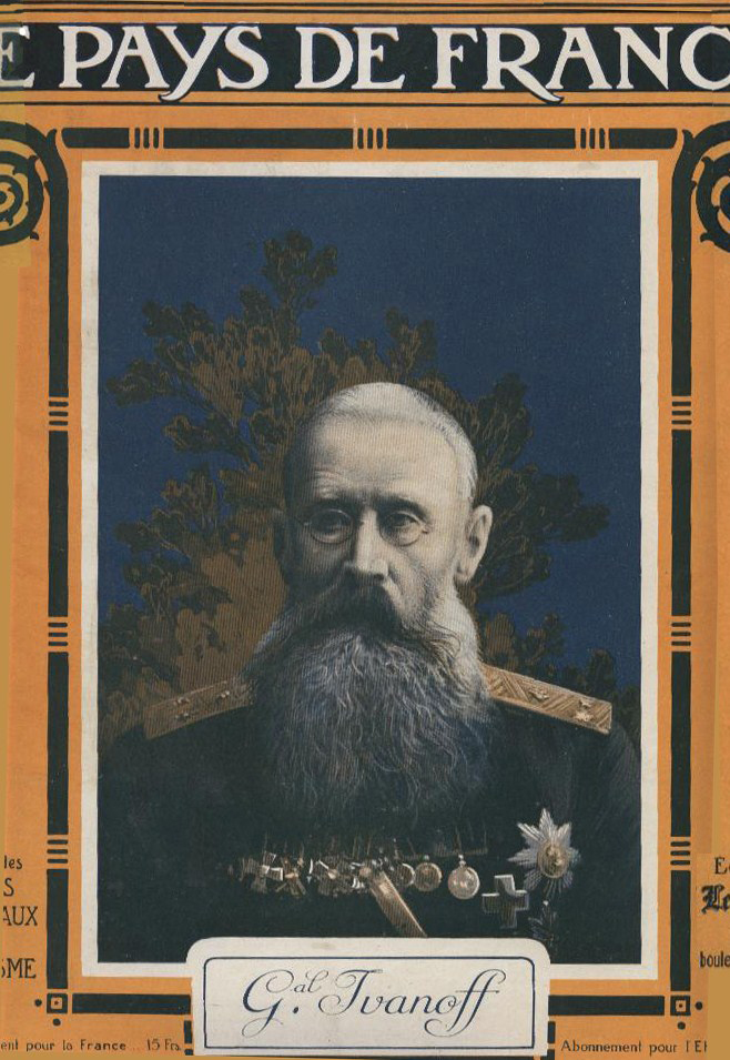 portrait du général Nicolas Ivanov en couveture du N°72 de l'hebdomadaire Le Pays de France.